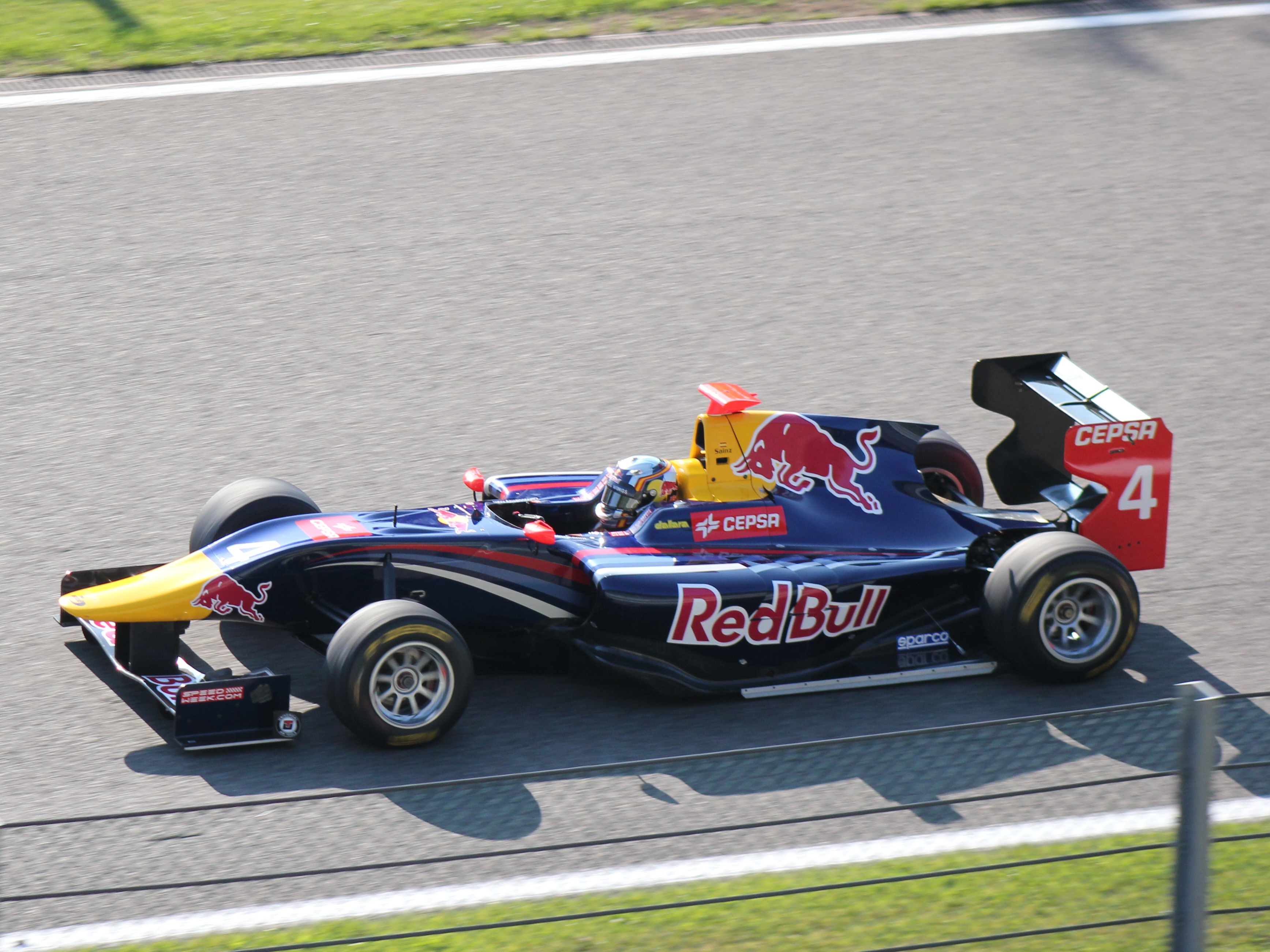 Carlos Sainz Jr. beim Rennwochenende in Belgien 2013